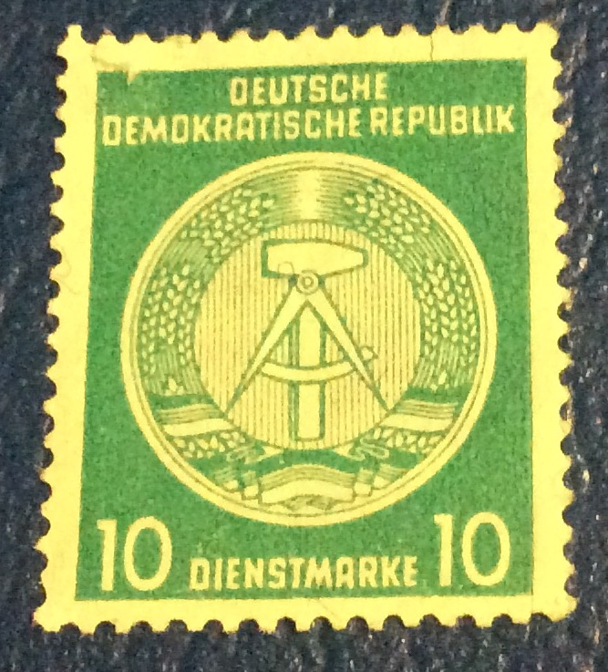 Почтовая марка ГДР